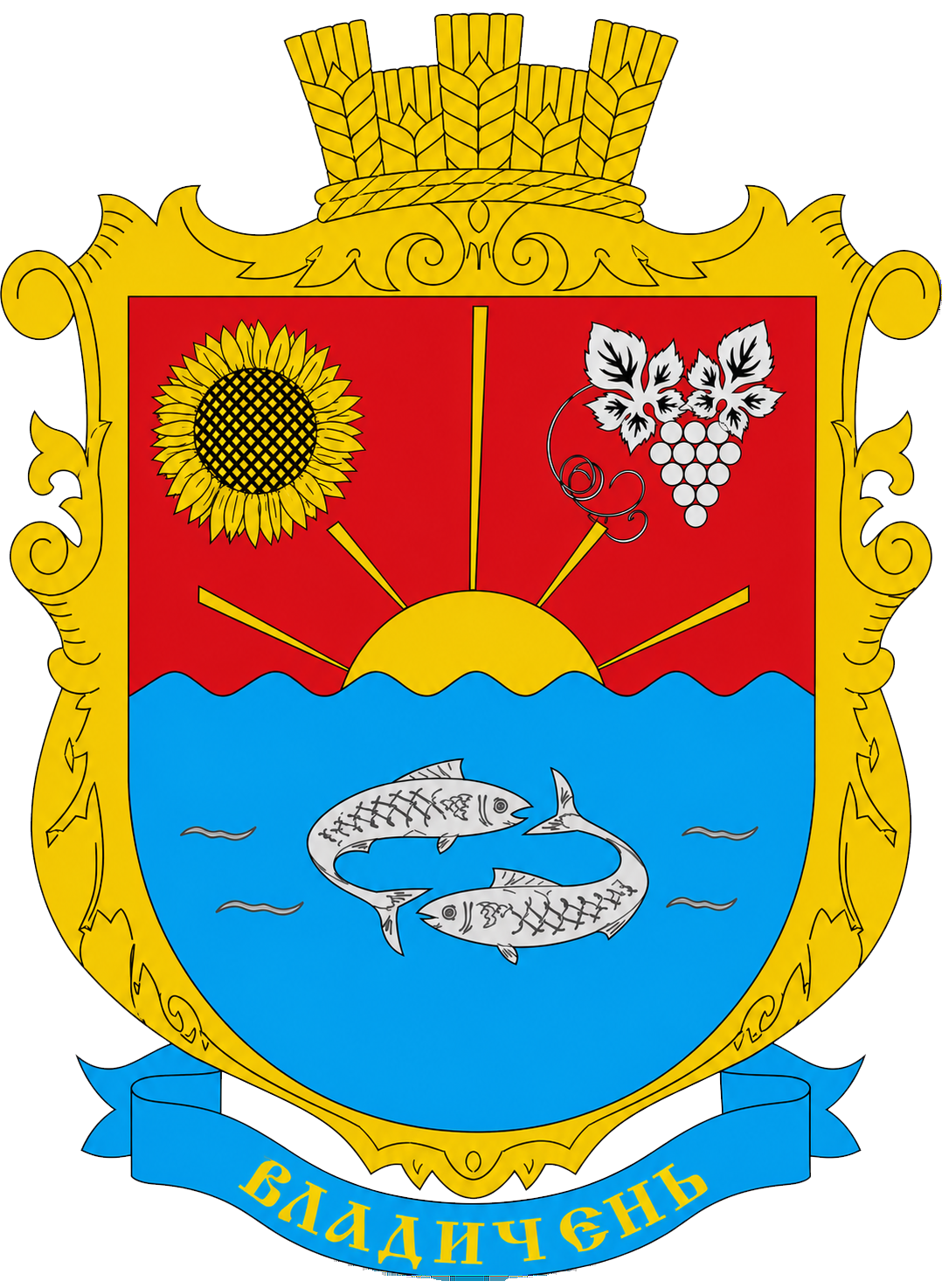 Герб села Владичень